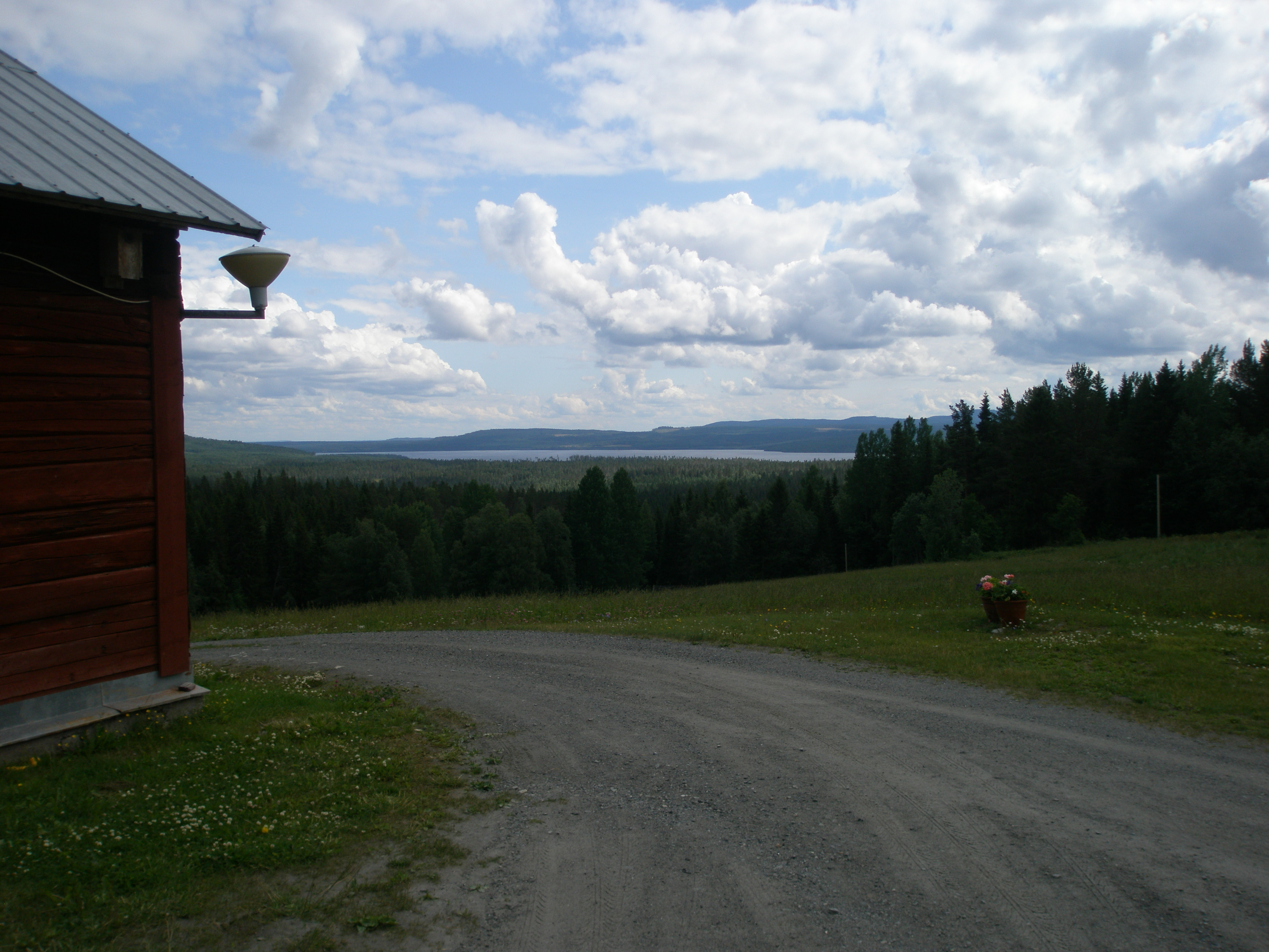 Brattmon, Offerdals socken, Krokoms kommun, Jämtland, Sverige.